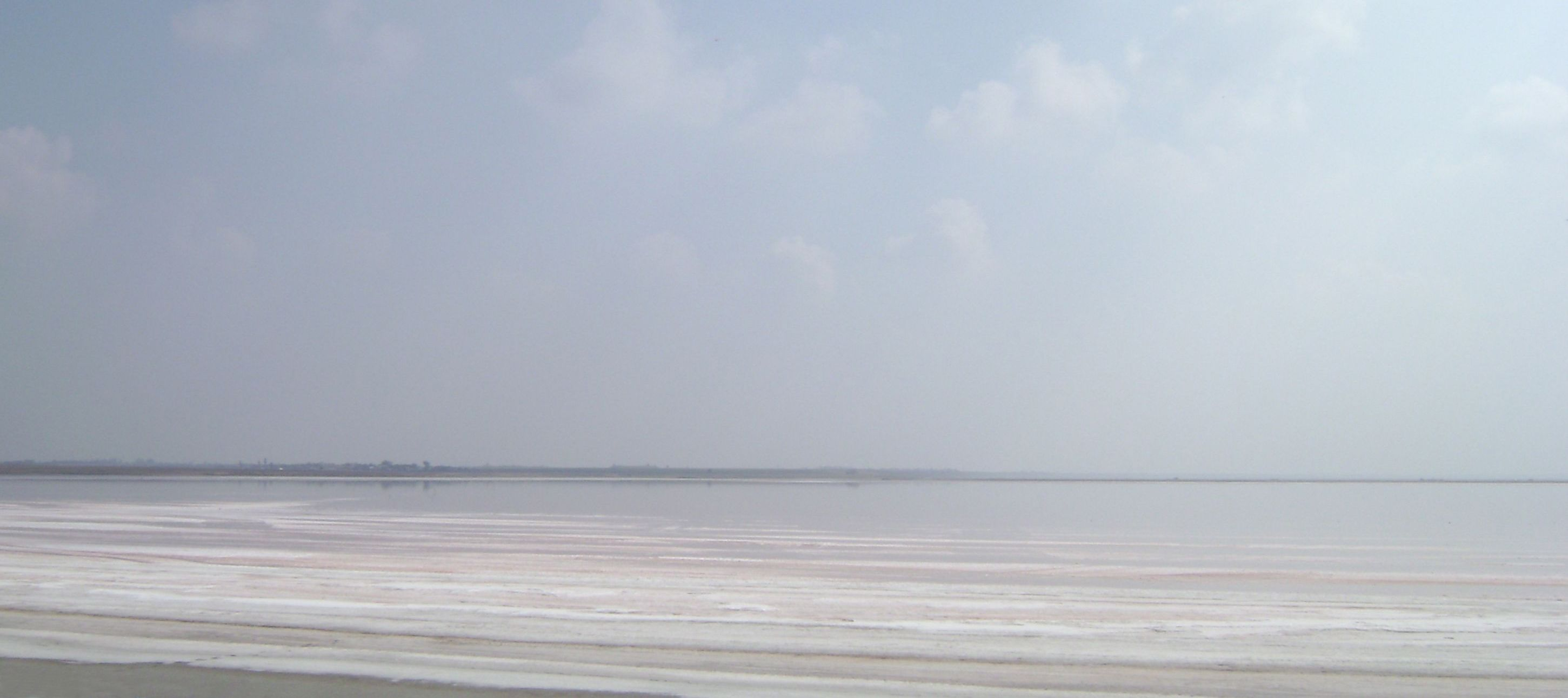 озеро Сиваш. около трассы E-105, M-18